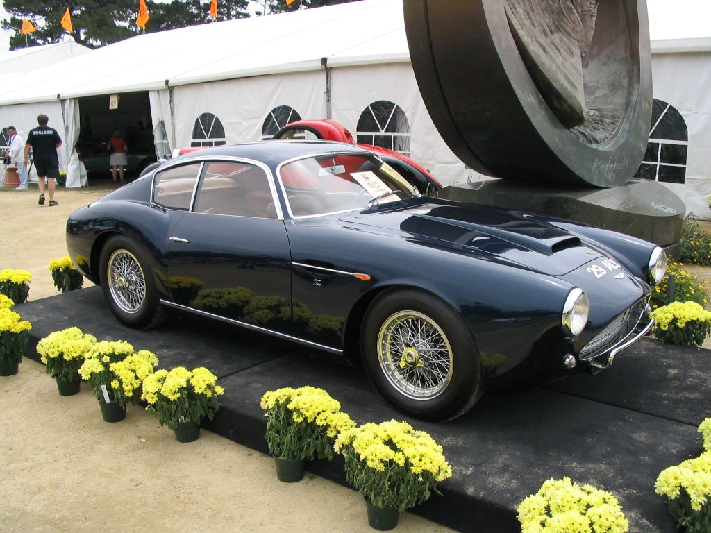 Aston Martin Zagato Baujahr 1961, fotografiert von Ramgeis in Pebble Beach, Kalifornien im August 2004, GNU-FDL